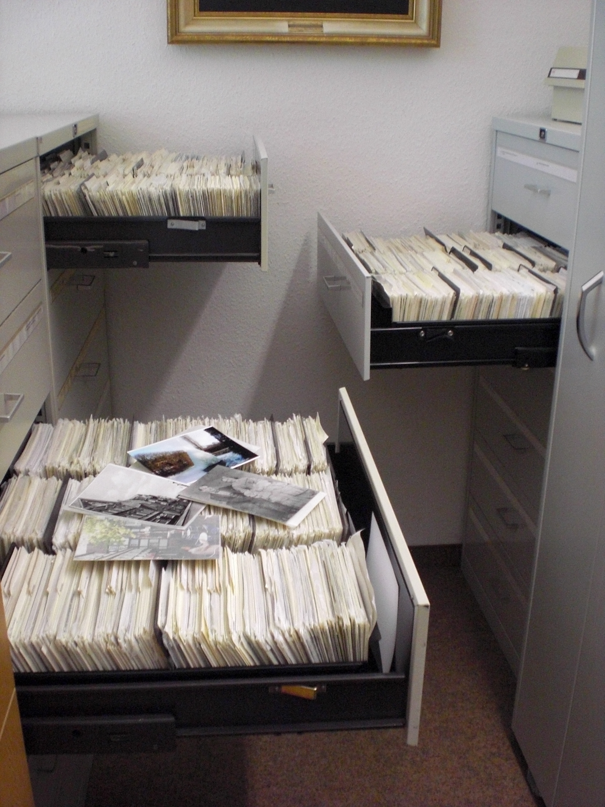 Schubladen mit Fotos im Archiv